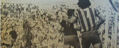 RC Slzo Mdp